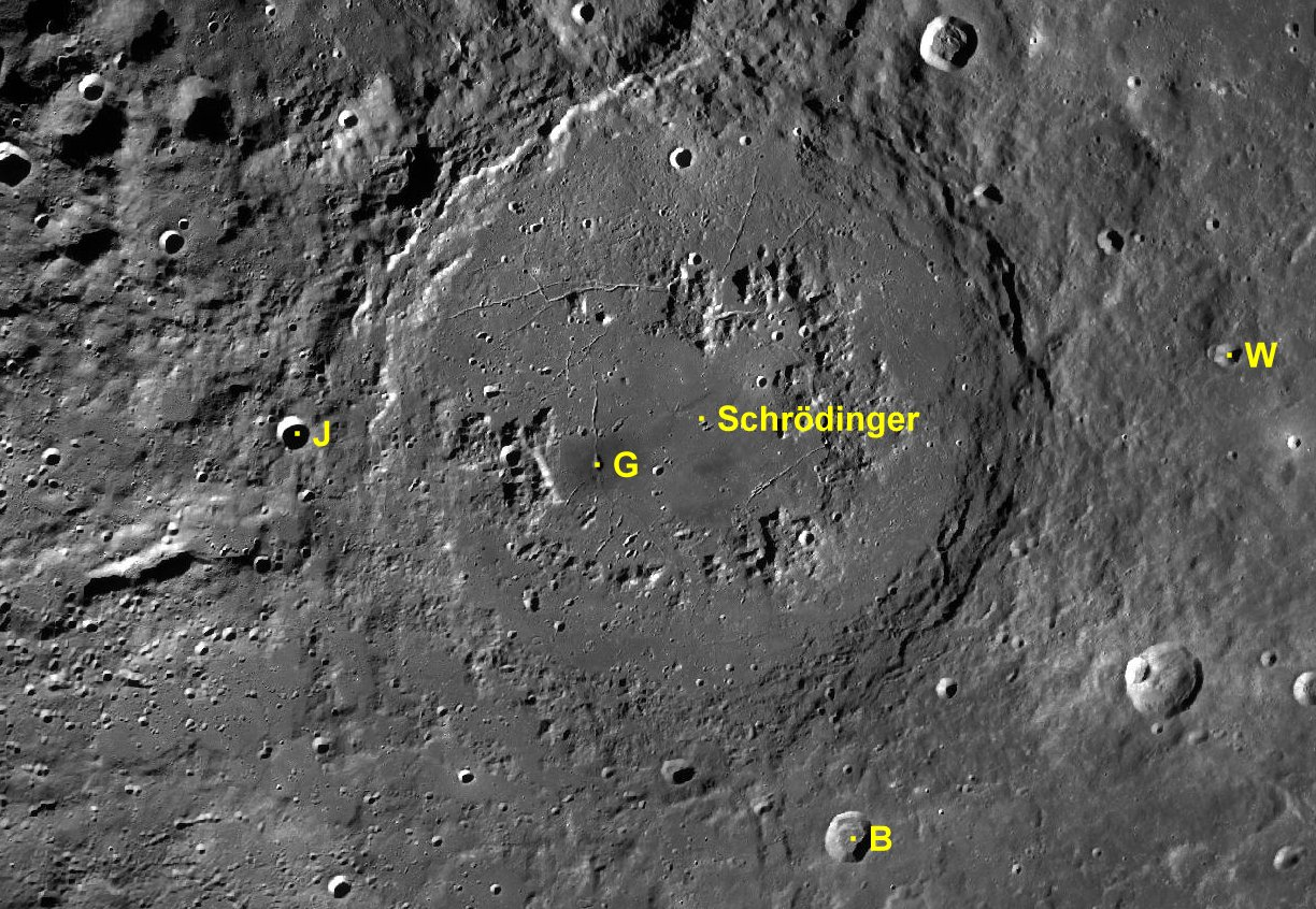 Cráter lunar Schrödinger. Cráteres satélite. (Imagen LRO)